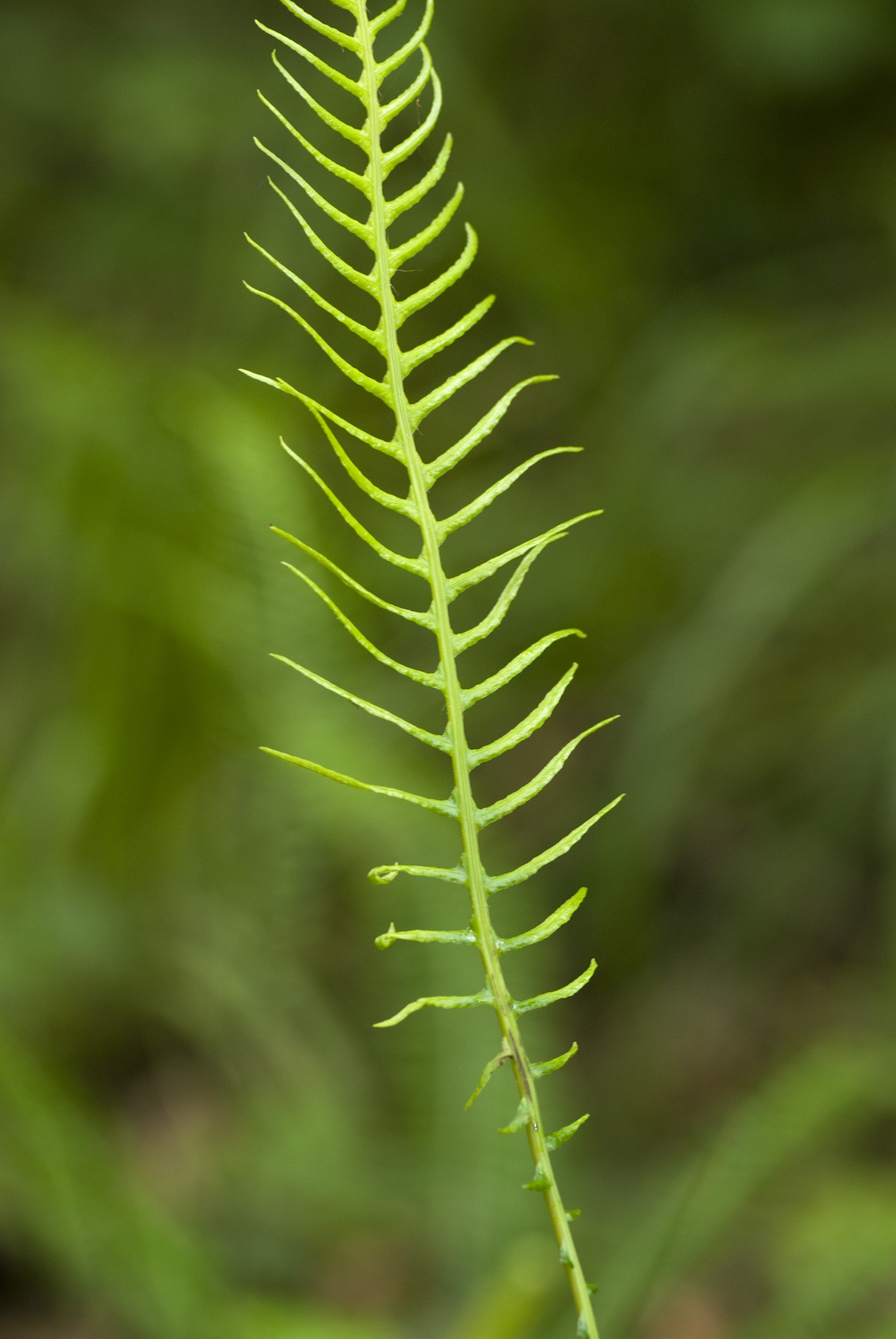 Blechnum spicant Eu (Seine-Maritime), France